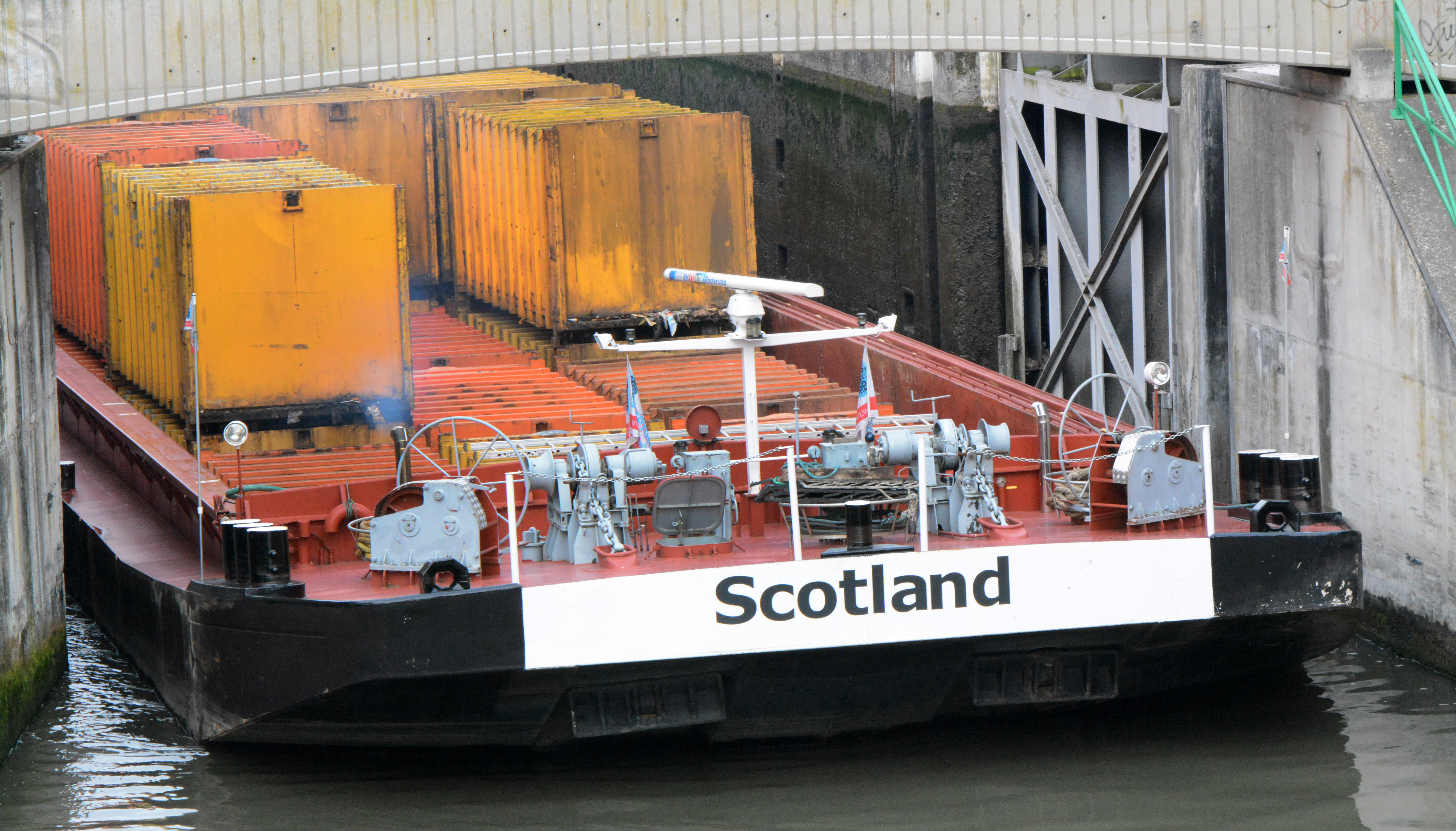 Péniche pousseur "Scotland" sortant de l'écluse du grand carré, sur la Deûle canalisée à Lille (nord de la France), en amont du port de Lille (2018), avec deux séries superposées de containers transportant des déchets ménagers et assimilés (l'autre péniche effectuant ce travail est nommée EL COYOTE)